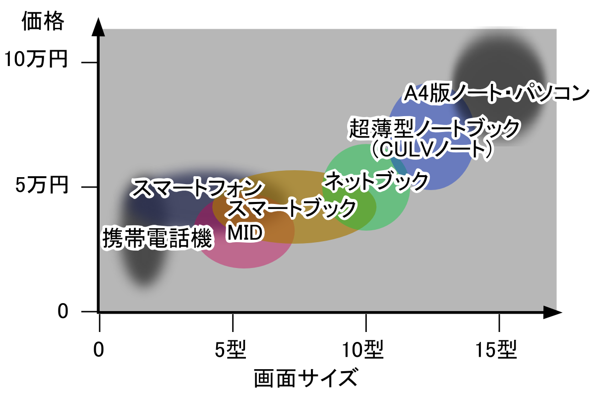 Notebook market graph J PNG file